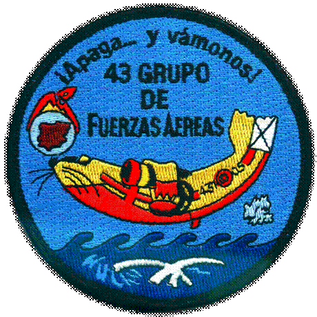 Emblema del 43 Grupo de Fuerzas Aéreas